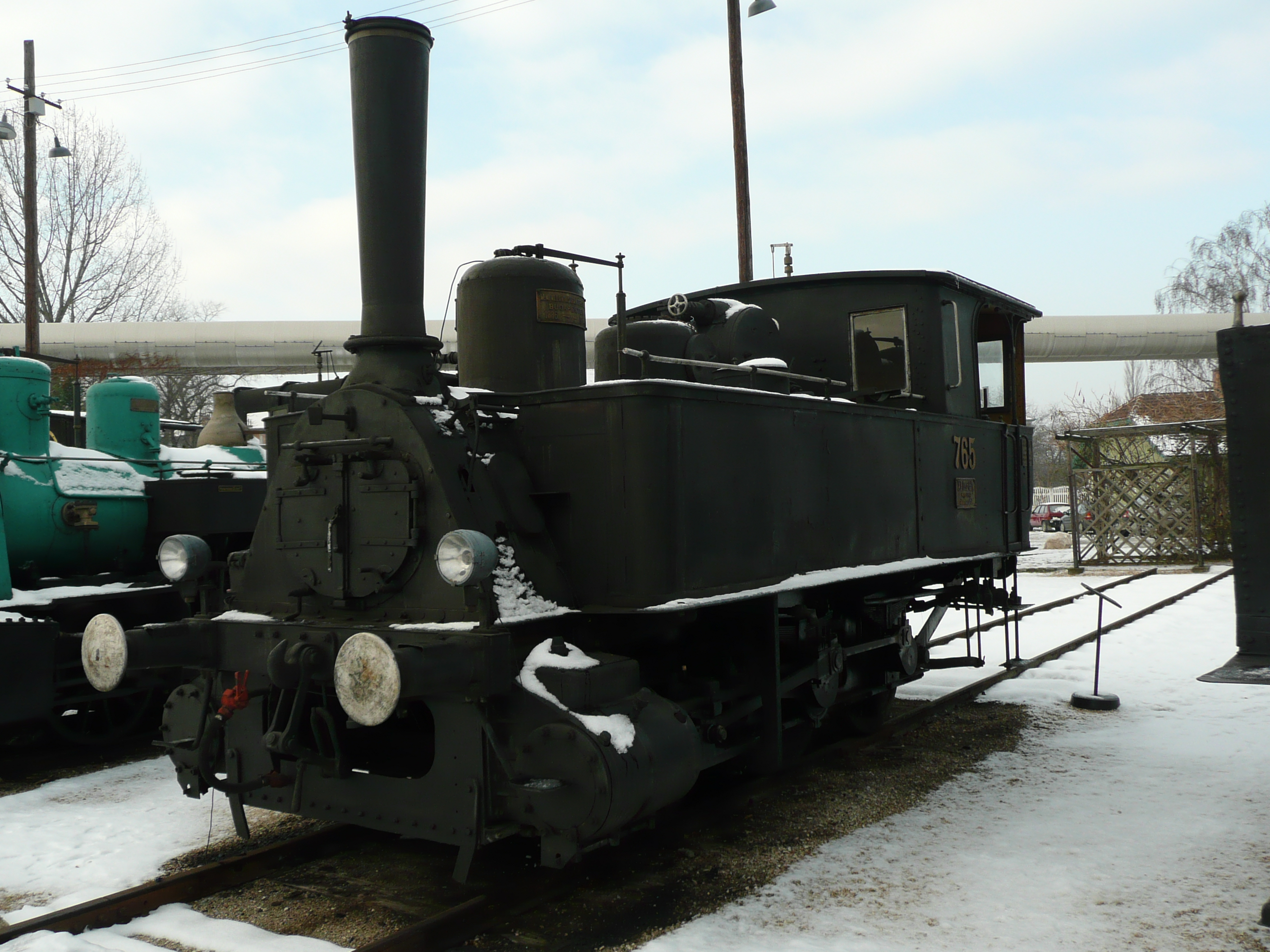 377.041 im Originalzustand im Bahnpark Budapest